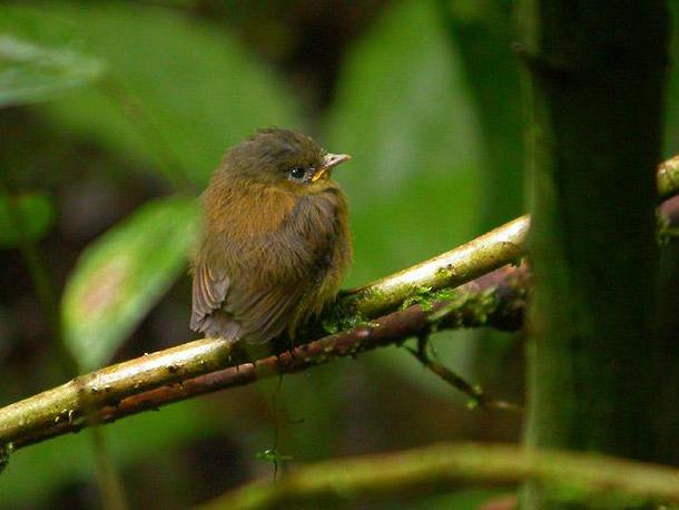 Pseudotriccus pelzelni